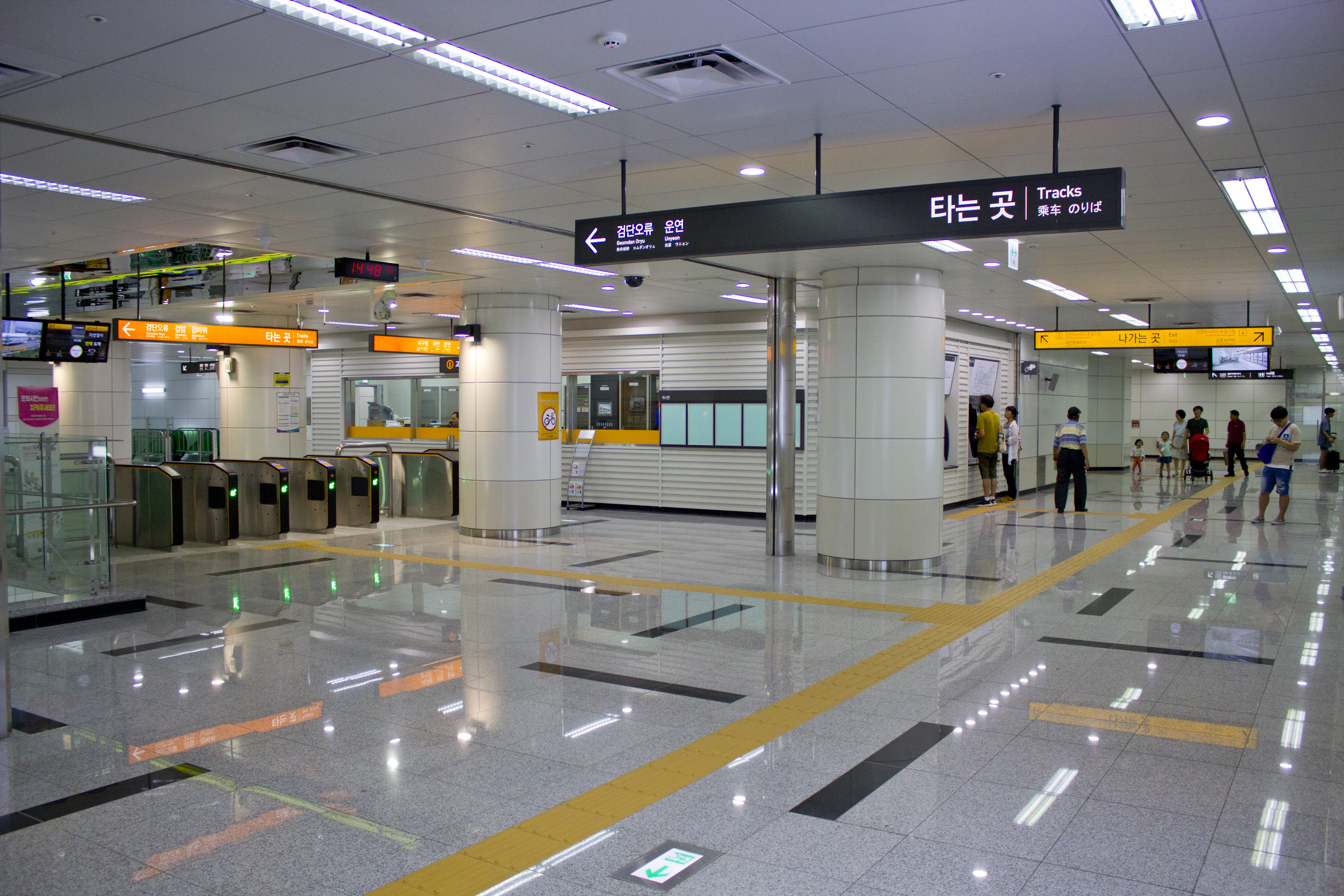 인천2호선 아시아드경기장역 맞이방(대합실)